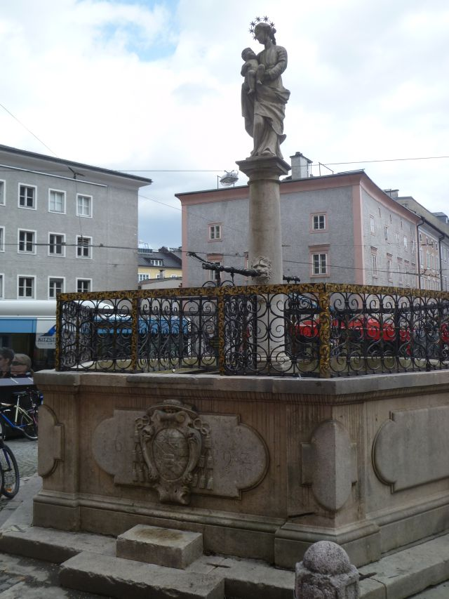 Marienbrunnen